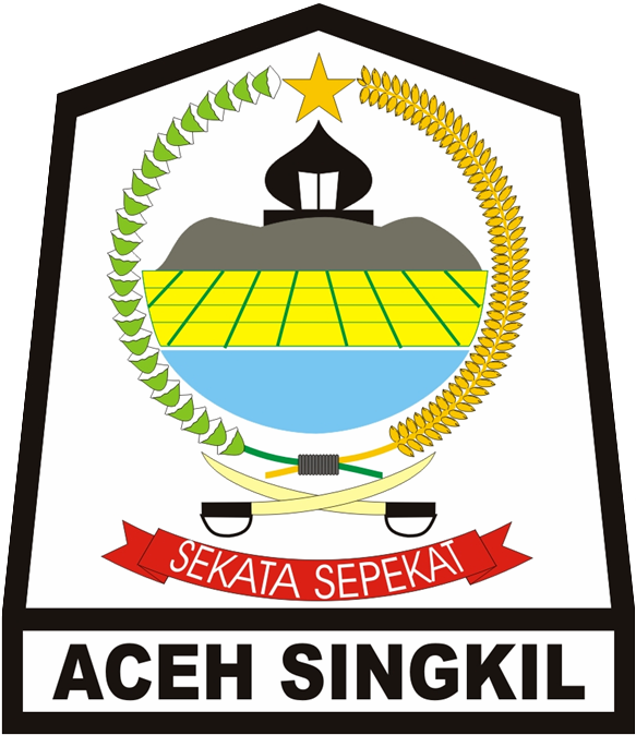 Lambang Kabupaten Aceh Singkil